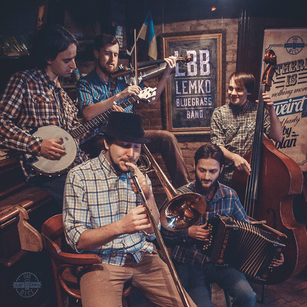 LBB, фото © Masha Weisberg